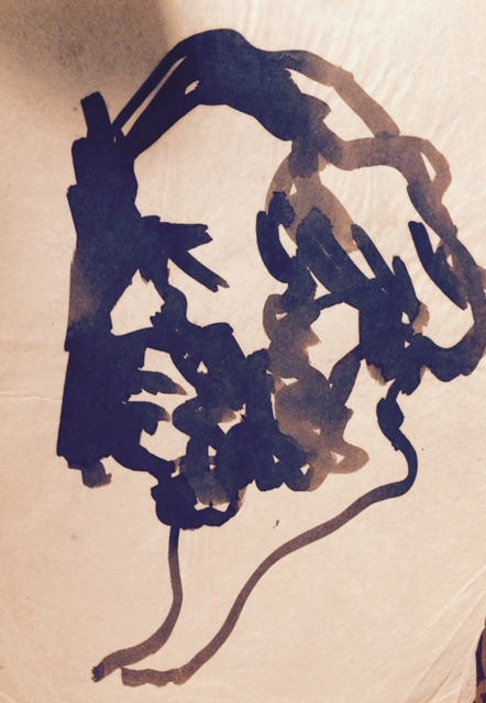 S/T (perfil de Gervasio Artigas), aguada sobre papel